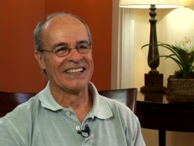 Ator brasileiro Osmar Prado em imagem do acervo da TV Brasil.